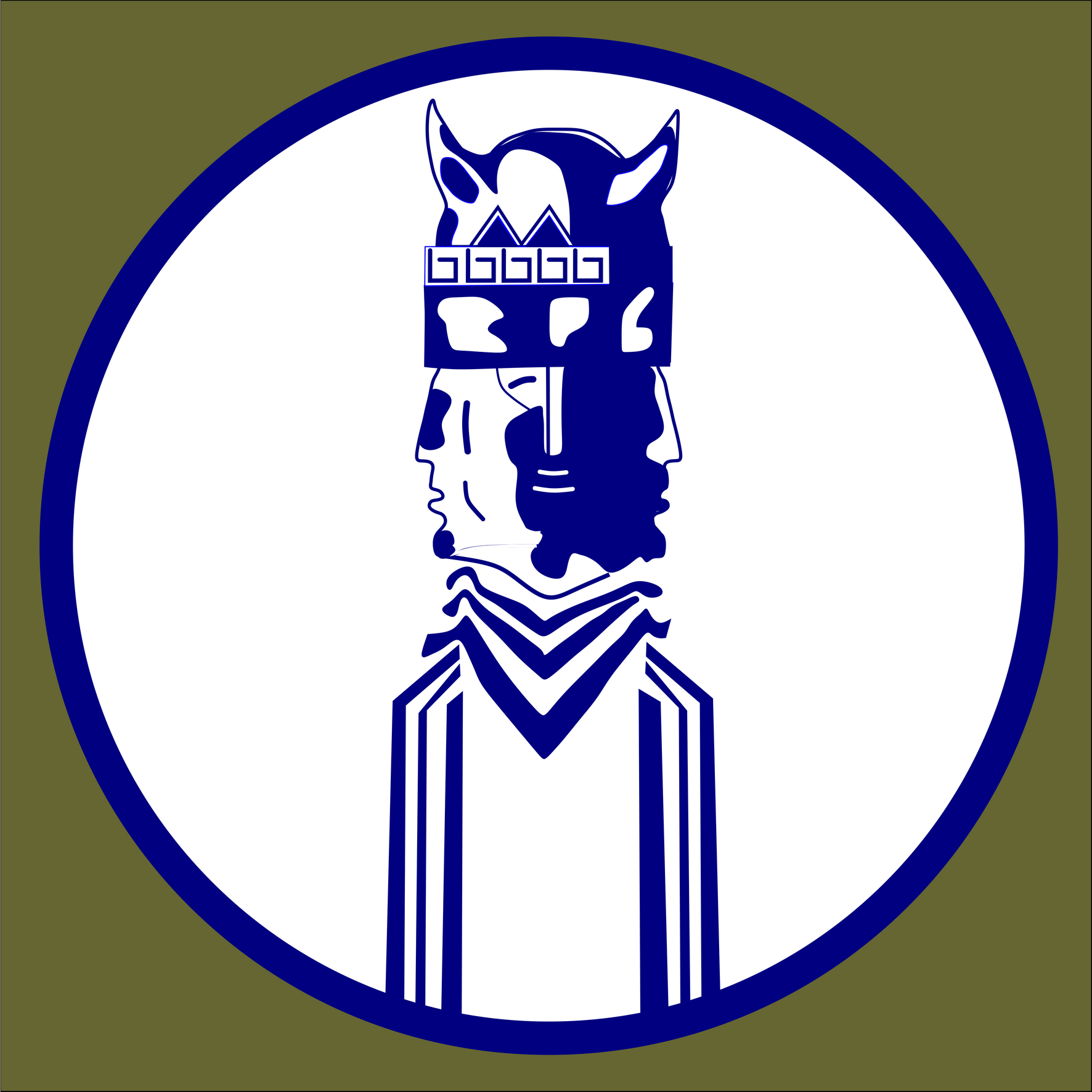 Znak malowany na samolotach 2 eskadry bliskiego rozpoznania lotnictwa morskiego, stosowany w latach 1927 - 1932